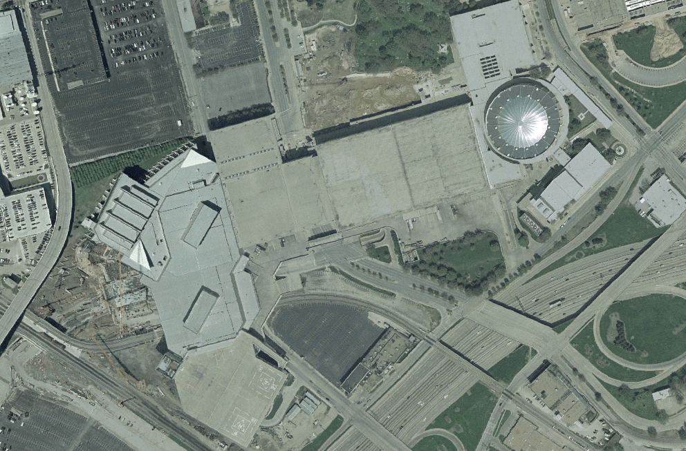 nasa world wind 1.3.5